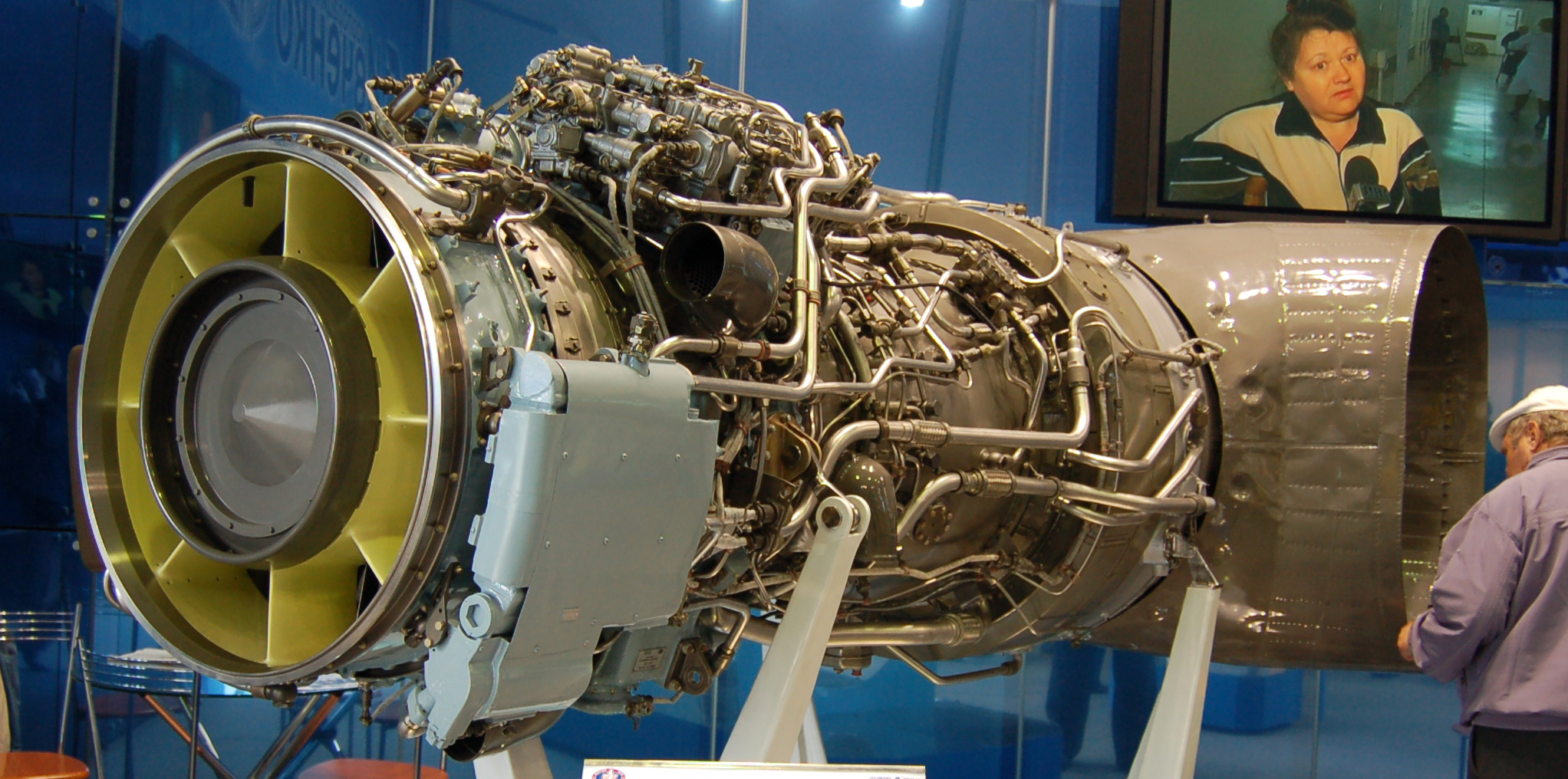 Двигатель Д136 (модификация АИ136Т). МАКС-2009